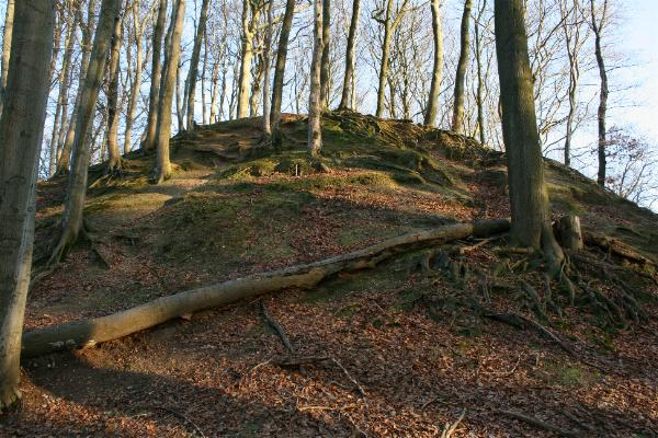 Alde Berg in Wegberg-Dalheim